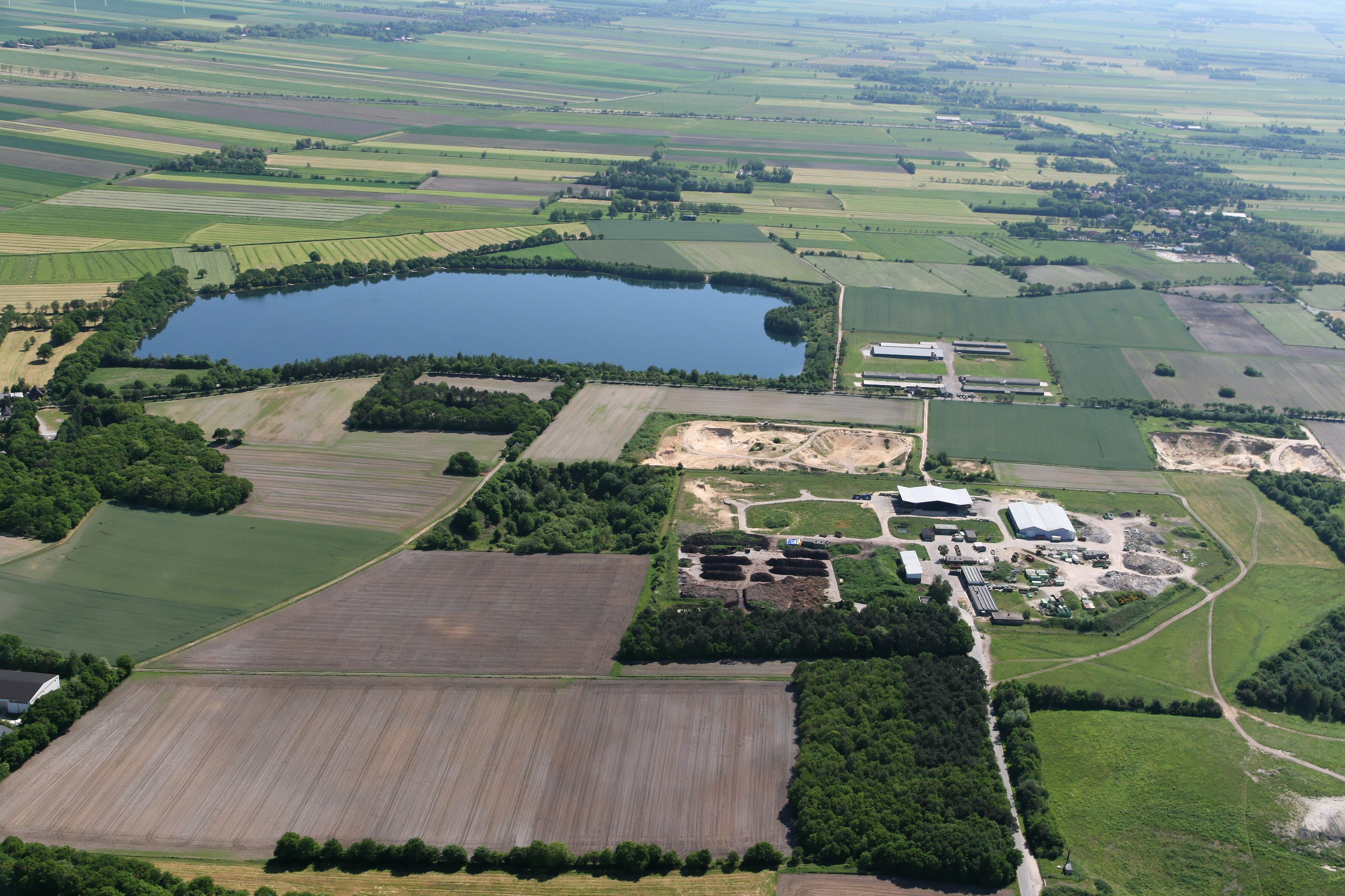 Gudendorfer See und Recyclingzentrum bei Cuxhaven-Altenwalde.